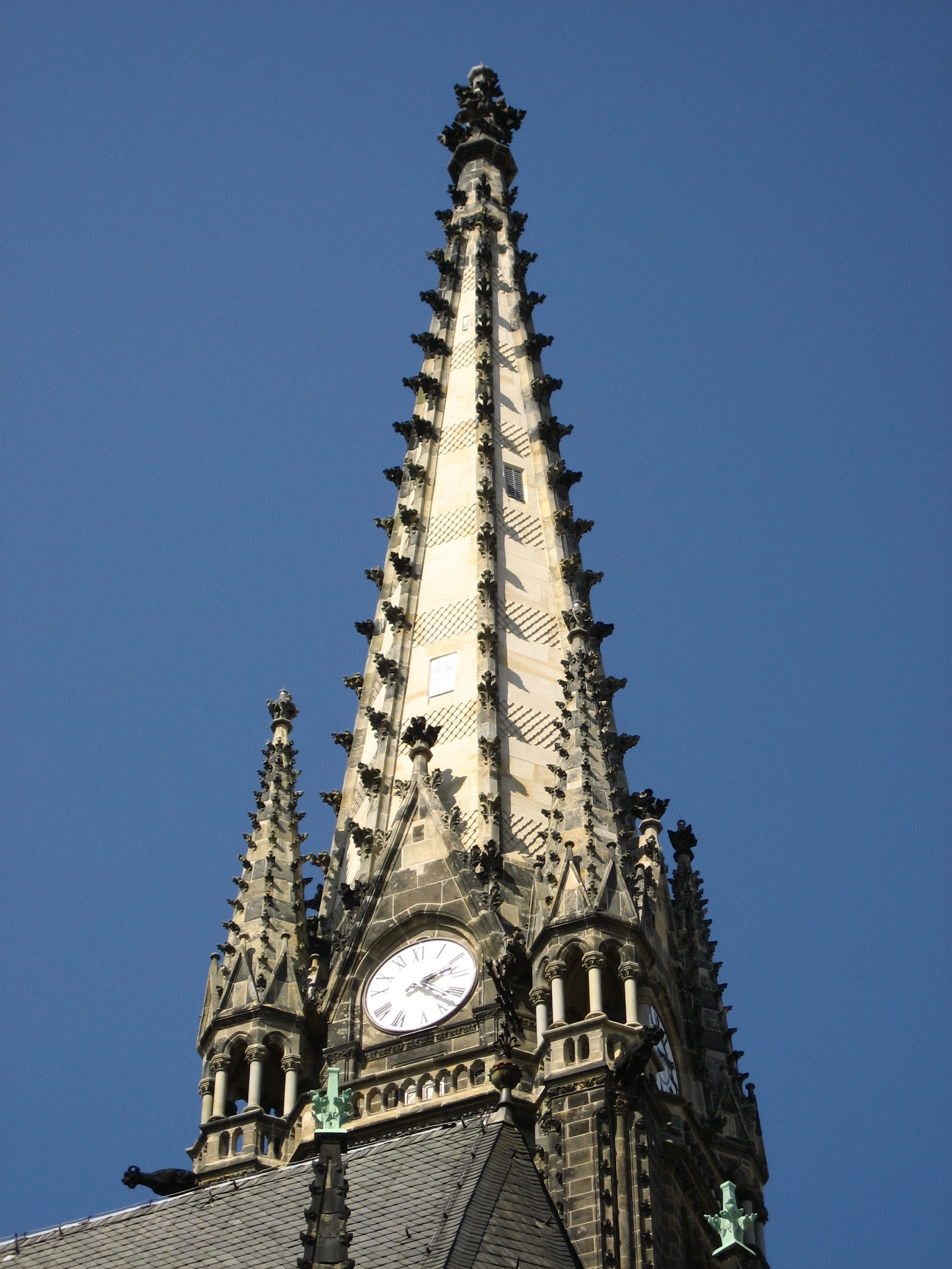 Neu aufgebaute Spitze des Turms der Peterskirche in Leipzig